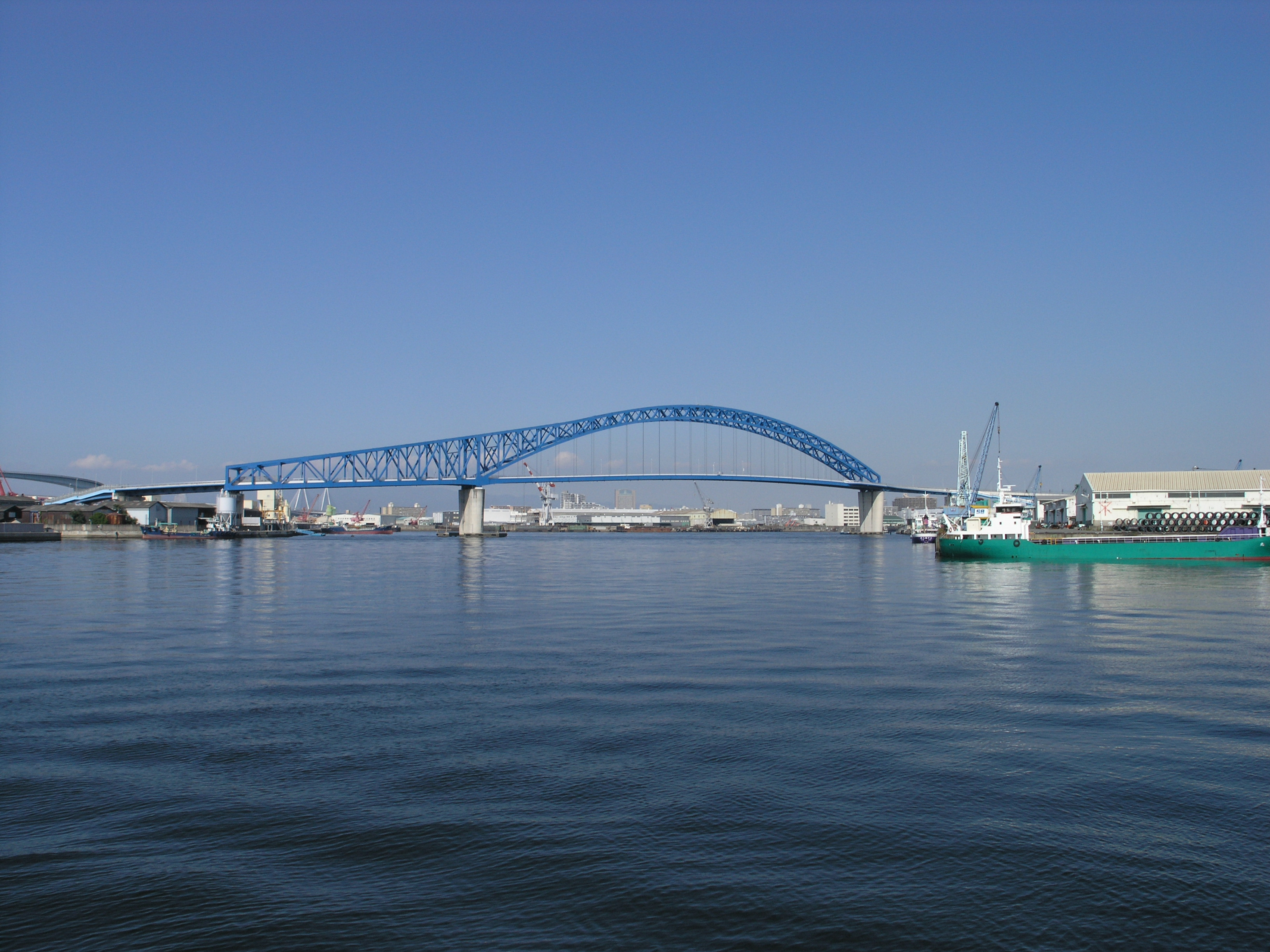 千歳橋（大阪市大正区） 2008年10月撮影。 機材：C8080WZ 撮影者：Kansai explorer